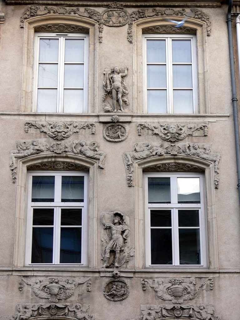 Maison des Adam (sculpteurs) détail de la façade, Nancy, Lorraine, France